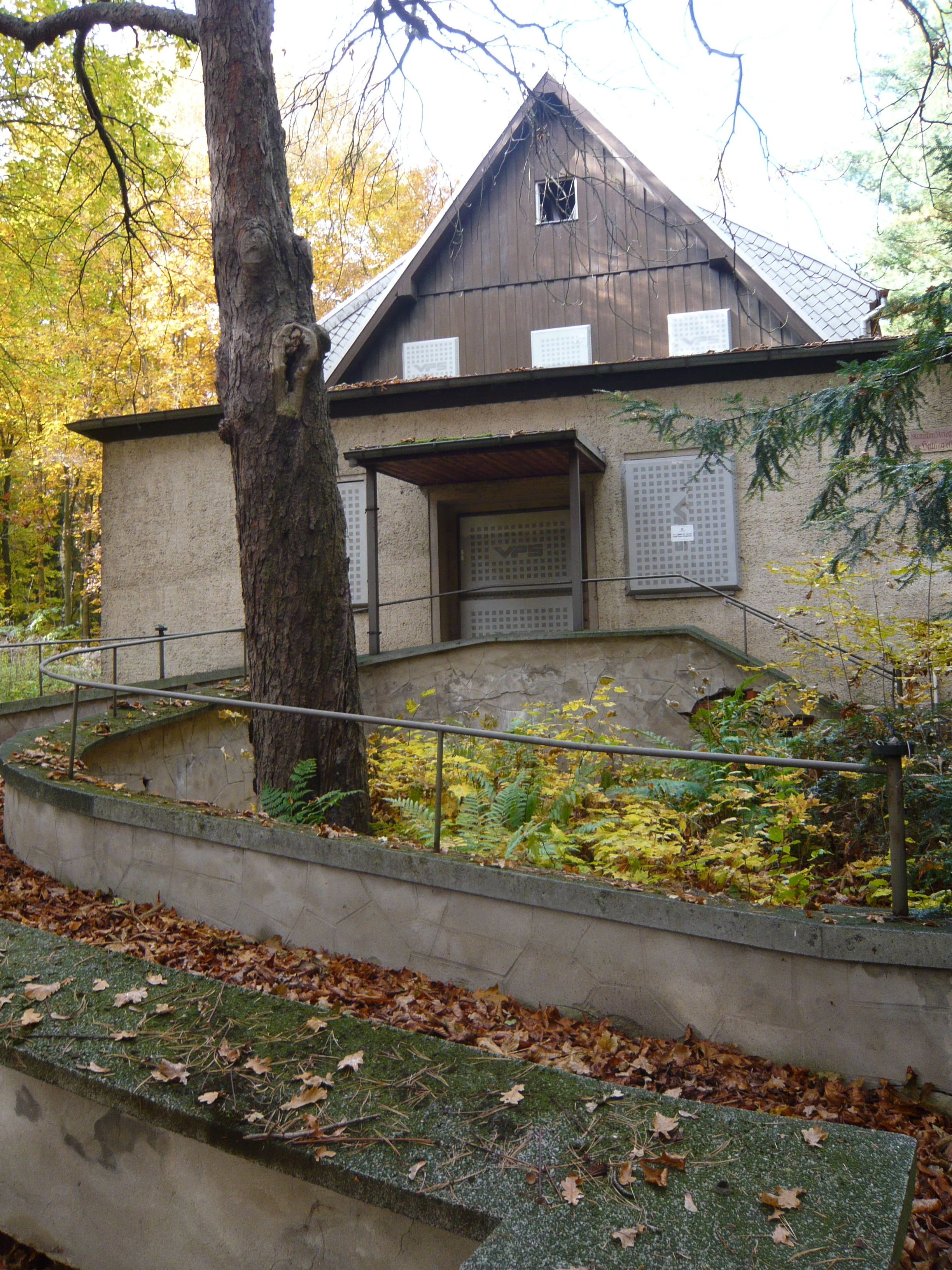 ein weiteres der leerstehenden Häuser des Gebäudekomplexes